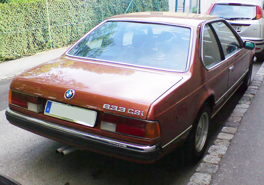 BMW 633 CSi Rear